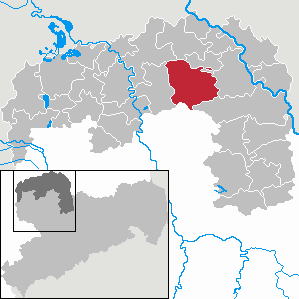 Mockrehna in Saxony - Landkreis Nordsachsen